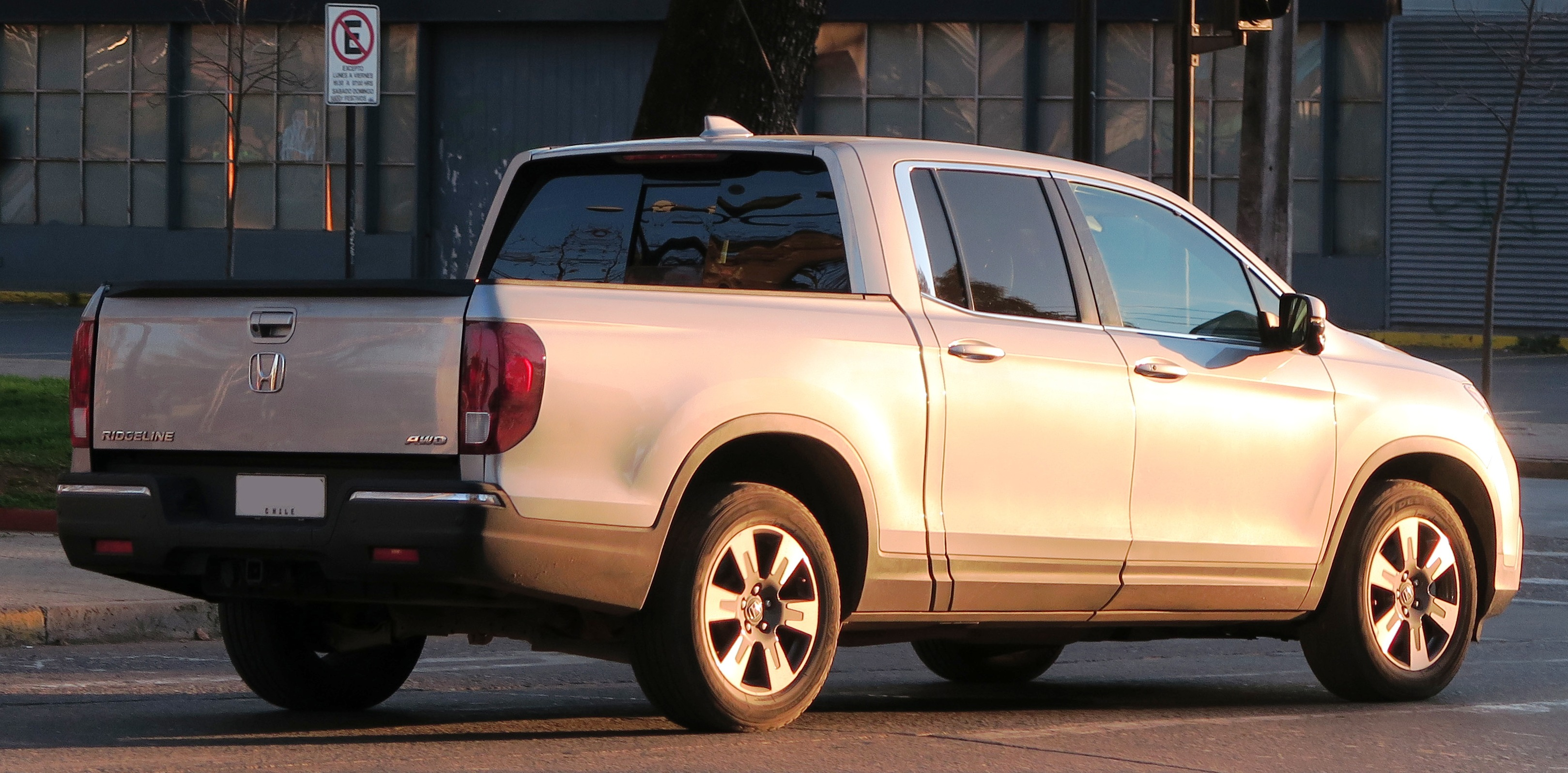 2017 Honda Ridgeline RTL–T